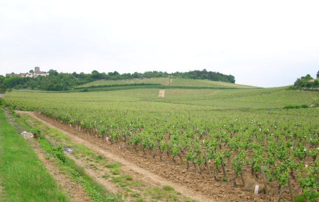 Vue du Clos du Roy